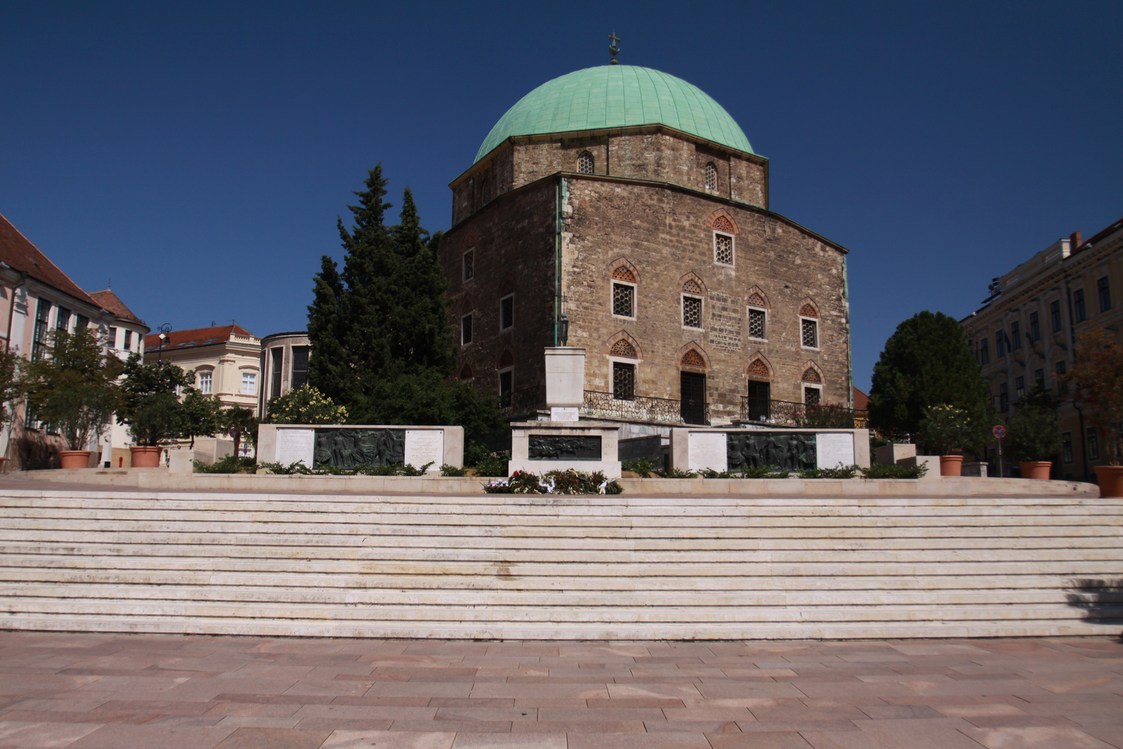 Régi török dzsámi (Pécs, Széchenyi tér) This is a photo of a monument in Hungary. Identifier: 18015